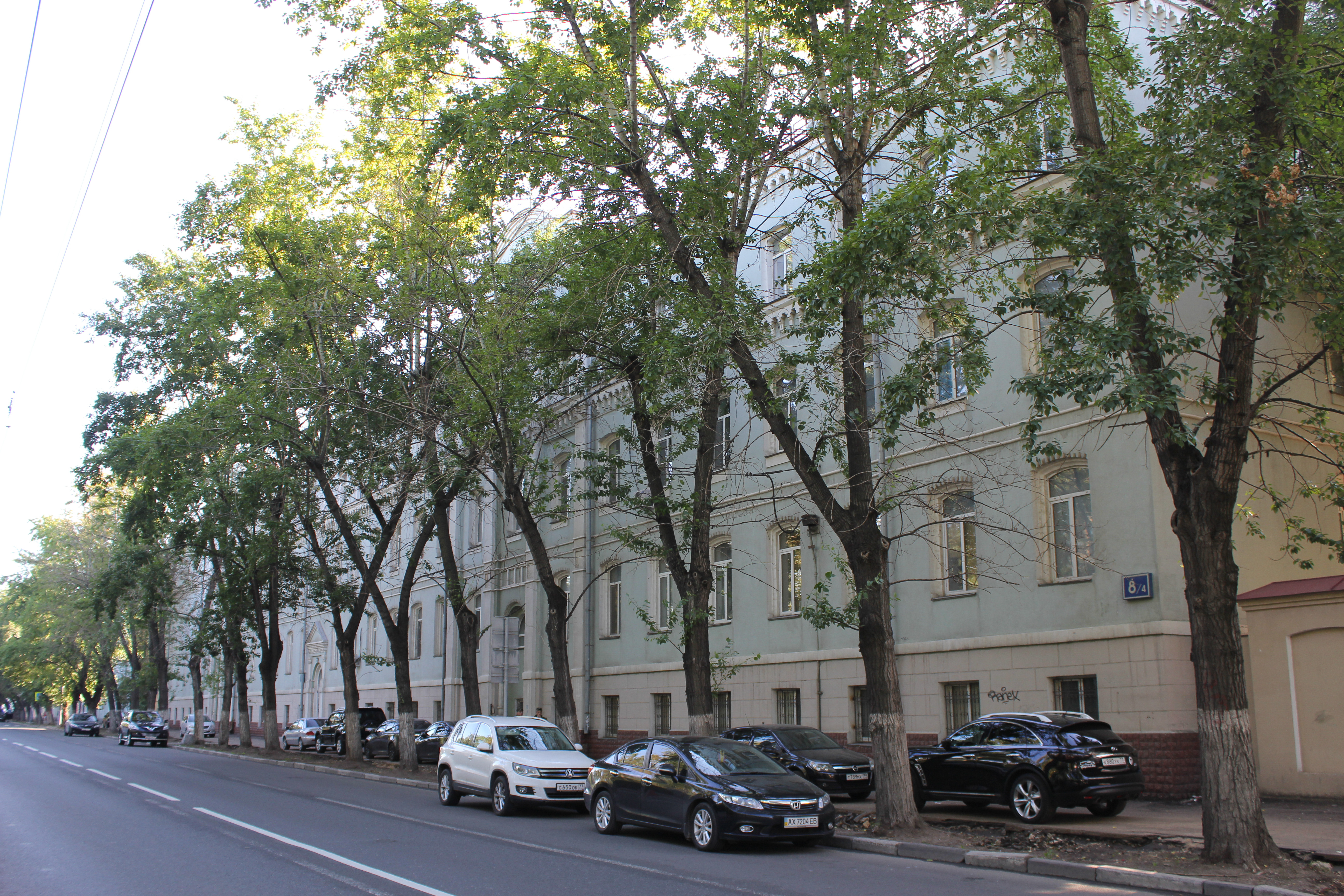 Вид на Александровские казармы с Подольского шоссеэ